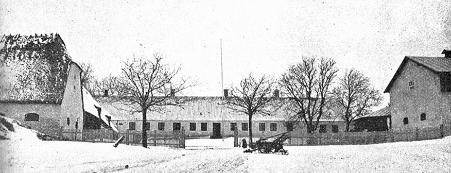 Heldagergård er en gammel gård, som blev kaldt Haldager, den nævnes første gang i 1314 og kom senere ind under Hvidkilde gods, som en avlsgård. Gården ligger i Tved Sogn, Sunds Herred, Svendborg Amt, Svendborg Kommune.